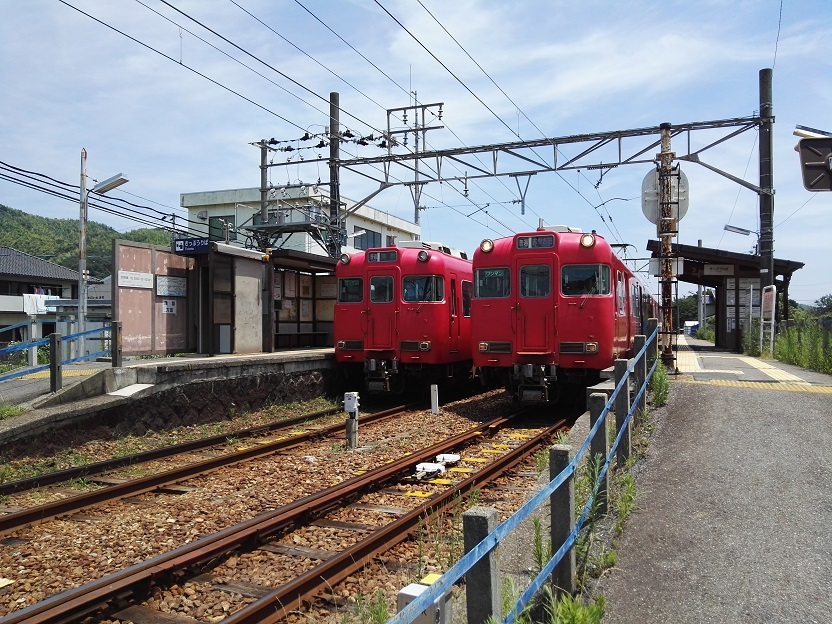 Two trains stop at Mikawa-toba station.